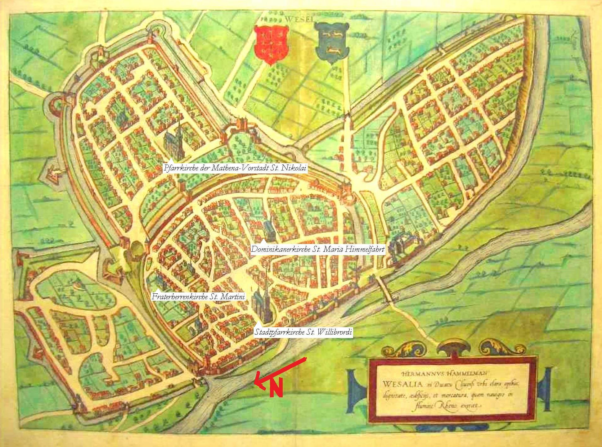 Kolorierter Kupferstich der Stadt Wesel (1588) mit St. Willibrord, Mathenakirche, St. Mariä Himmelfahrt und St. Martini; Bezeichnung der Kirchen und Richtungspfeil Nord: Rabanus Flavus